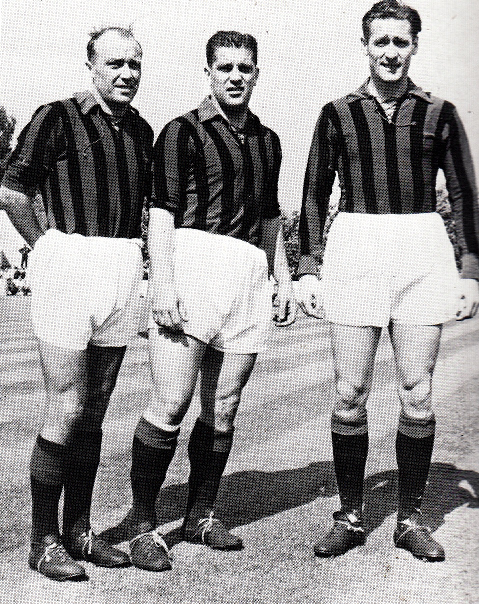 I calciatori svedesi Gunnar Gren (a sinistra), Gunnar Nordahl (al centro) e Nils Liedholm (a destra), il trio d'attacco "Gre-No-Li" del Milan nei primi anni 50 del XX secolo.